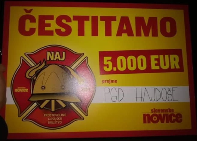 Priznanje za naj PGD 2019